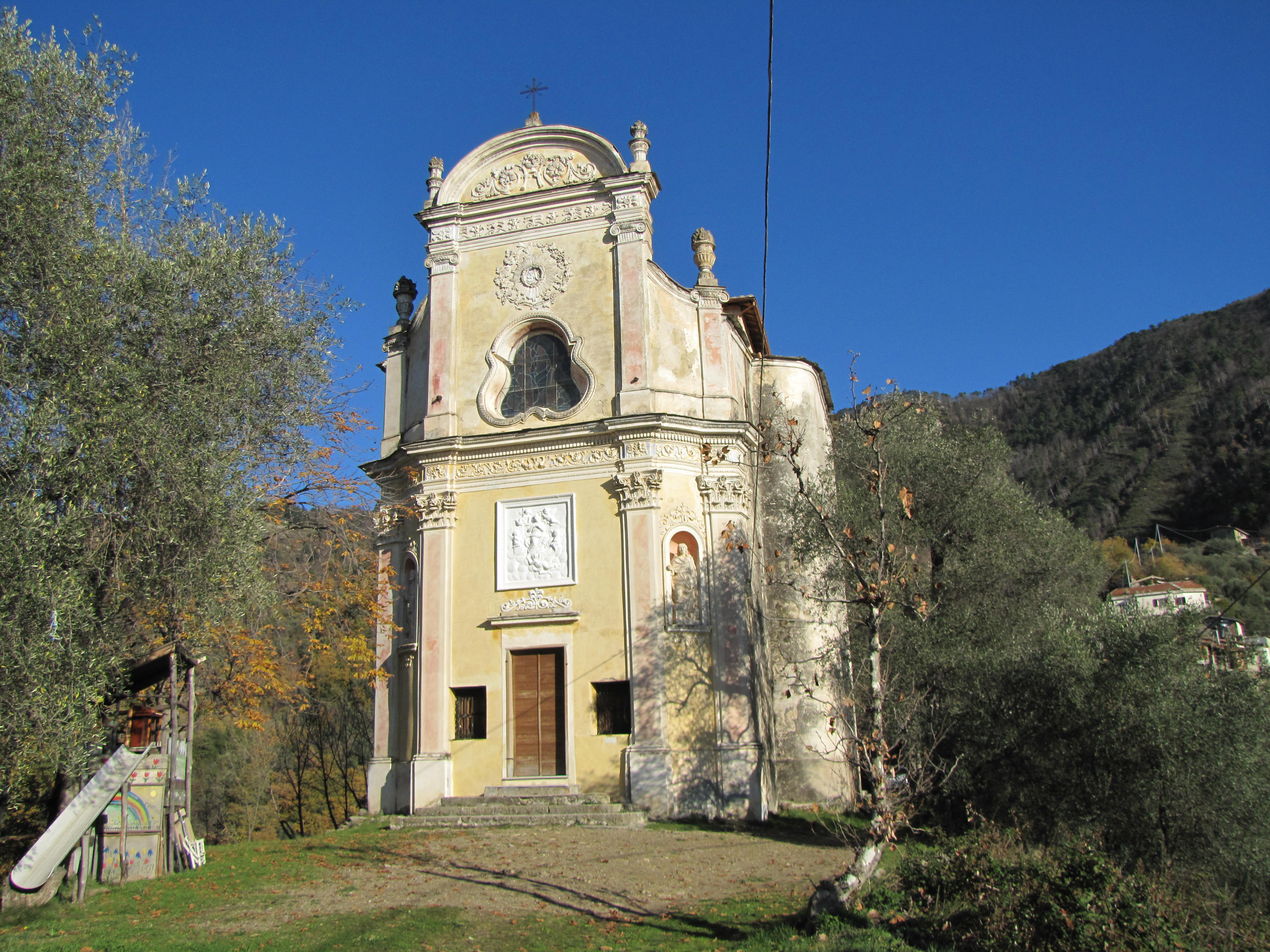 Il santuario di Nostra Signora Assunta di Berzi, Bajardo, Liguria, Italia